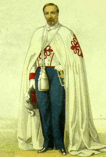 El duque de Montpensier, Antonio de Orleans (1824-1890), con el hábito de la Orden de Calatrava, de la que fue comendador mayor.